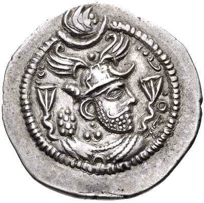 Dracma do xá sassânida Perozes I